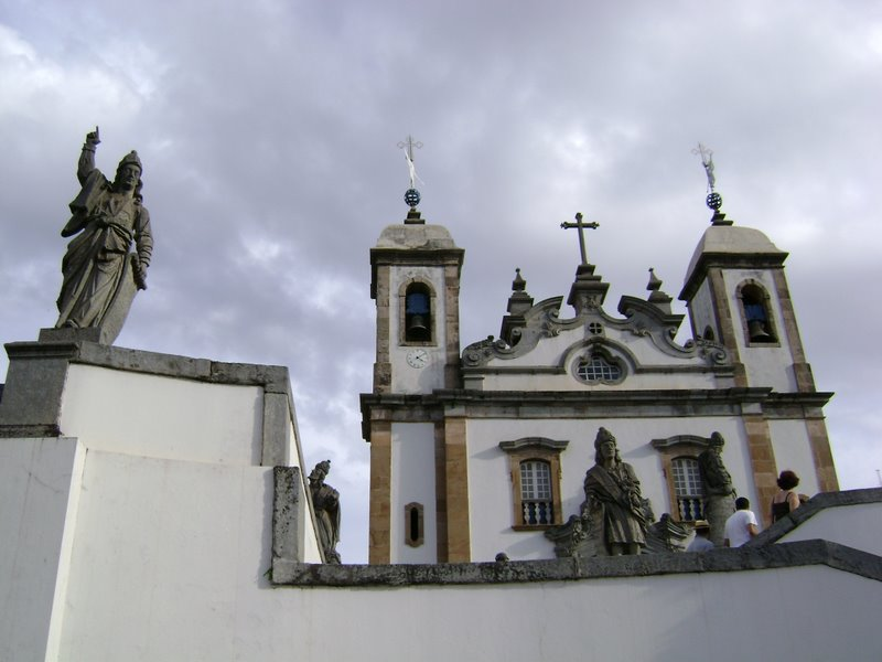 Vista geral dos profetas (Aleijadinho) e da Basílica de Congonhas do Campo, MG, Brasil